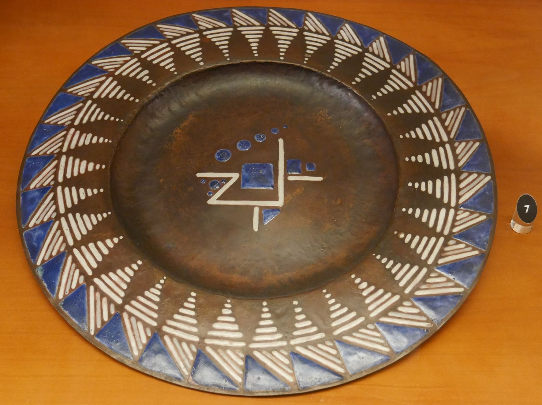 Exposé au Musée des Beaux-Art de Lyon Dinanderie ; Objets d'art XXe siècle, n° d'inventaire 1992-1. Email sur cuivre martelé et patiné, diamètre en cm : 45,3 ; Hauteur en cm : 2. Signature ; Inscription gravée ; au revers ; BEYER. Issu de la collection Roche Thierry ; entrée dans les collections du Musée des Beaux-Arts janvier 1992; Lyon.